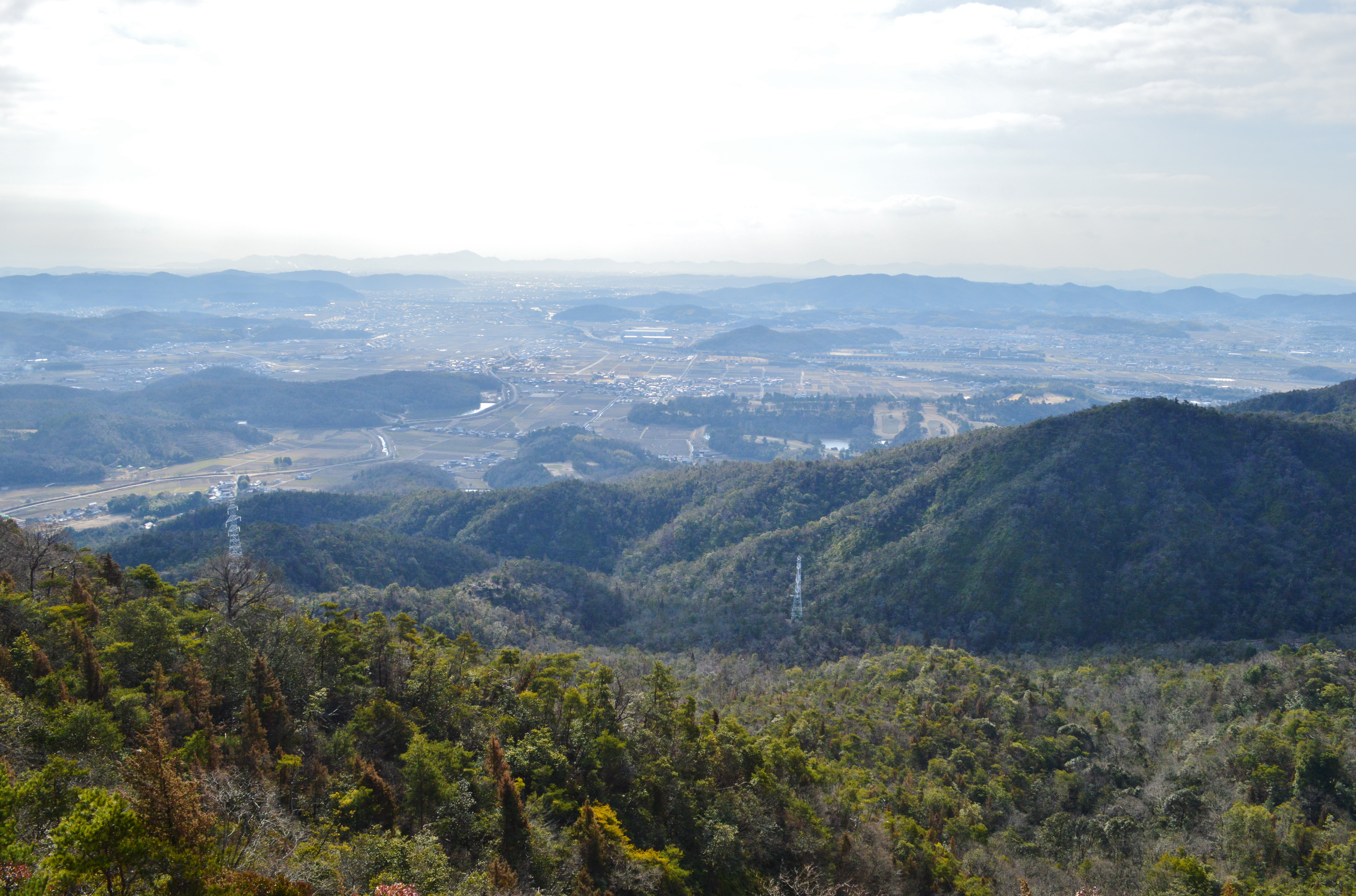 鬼城山から望む吉備地方